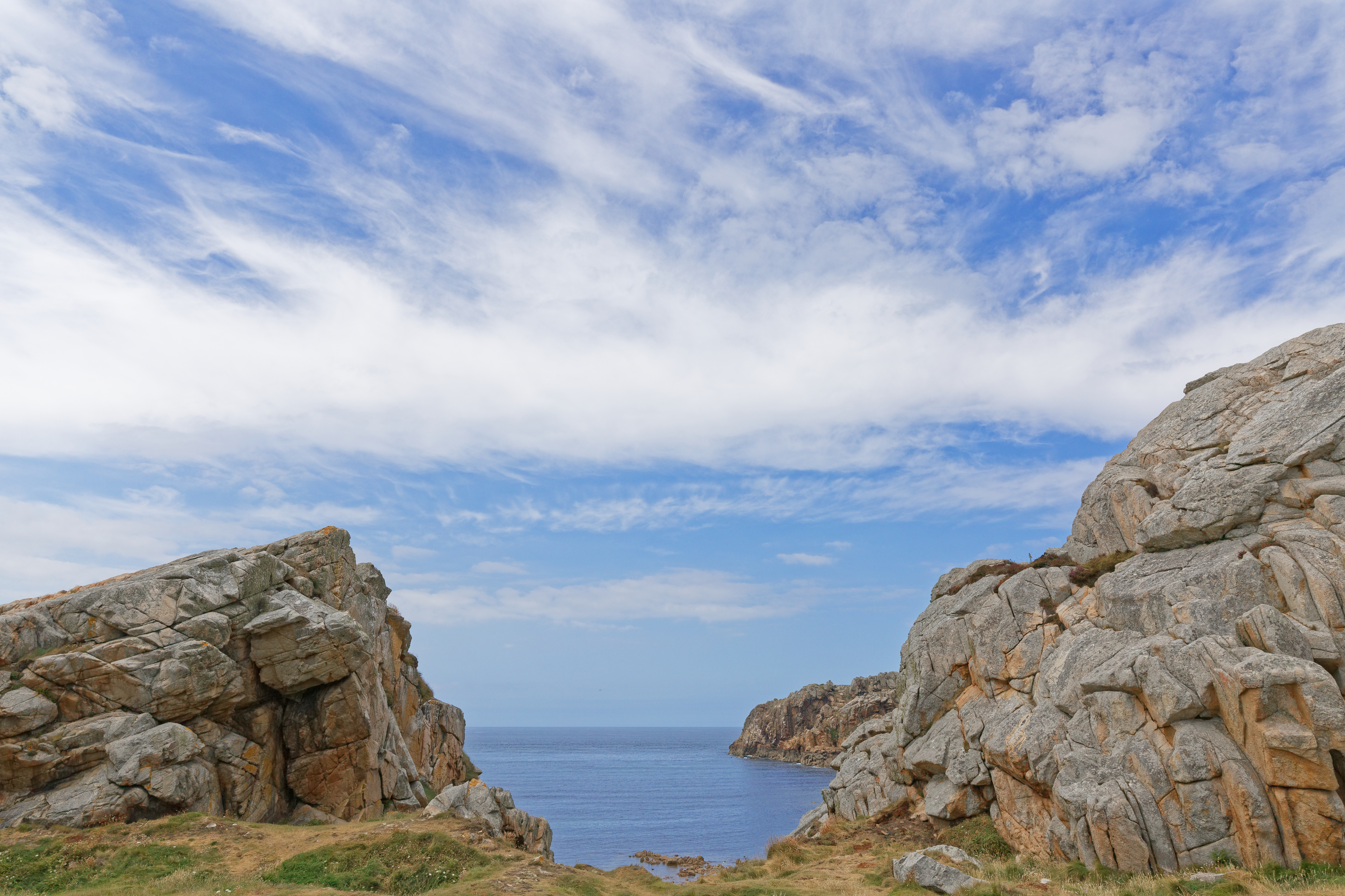 Le GR 34 sur la commune de Plougastel avec la pointe de Primel.